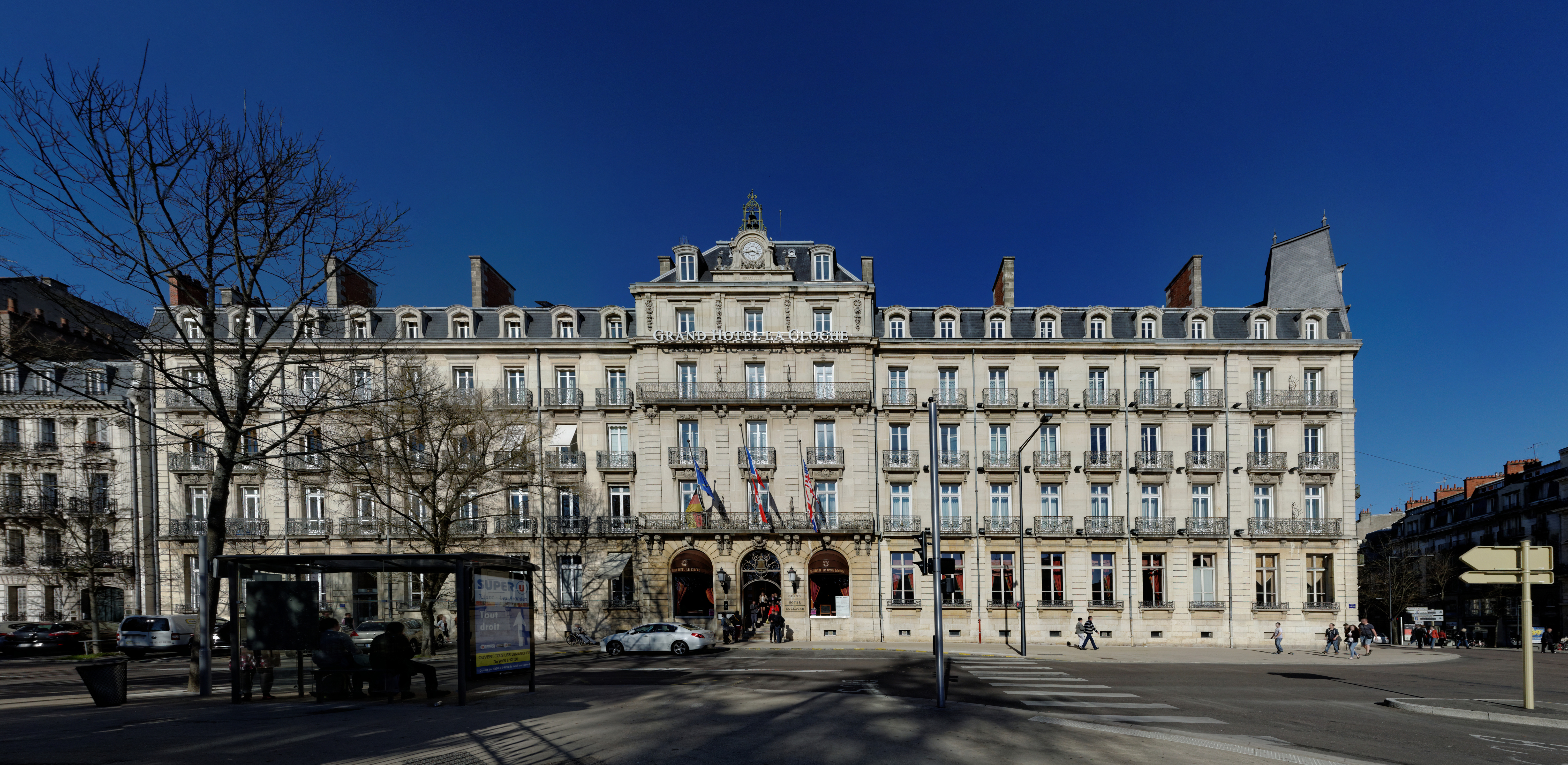 Vue panoramique du Grand Hôtel La cloche, place Darcy, à Dijon (France)